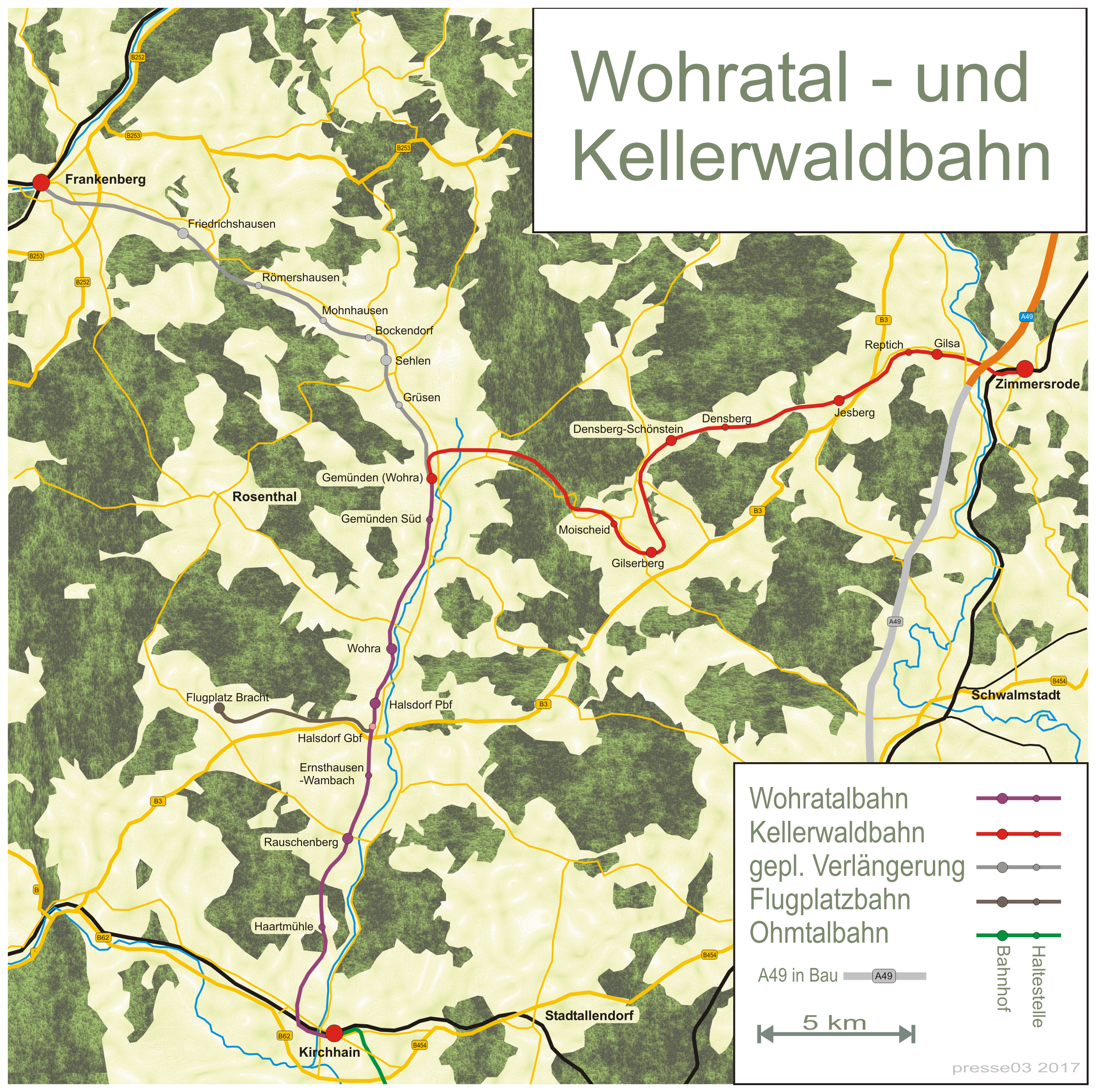 Karte der Verläufe von Wohratal- und Kellerwaldbahn einschließlich geplante (nie ausgeführte) Verlängerung nach Frankenberg (Eder) und Abzweig zum ehem. Flugplatz Bracht.